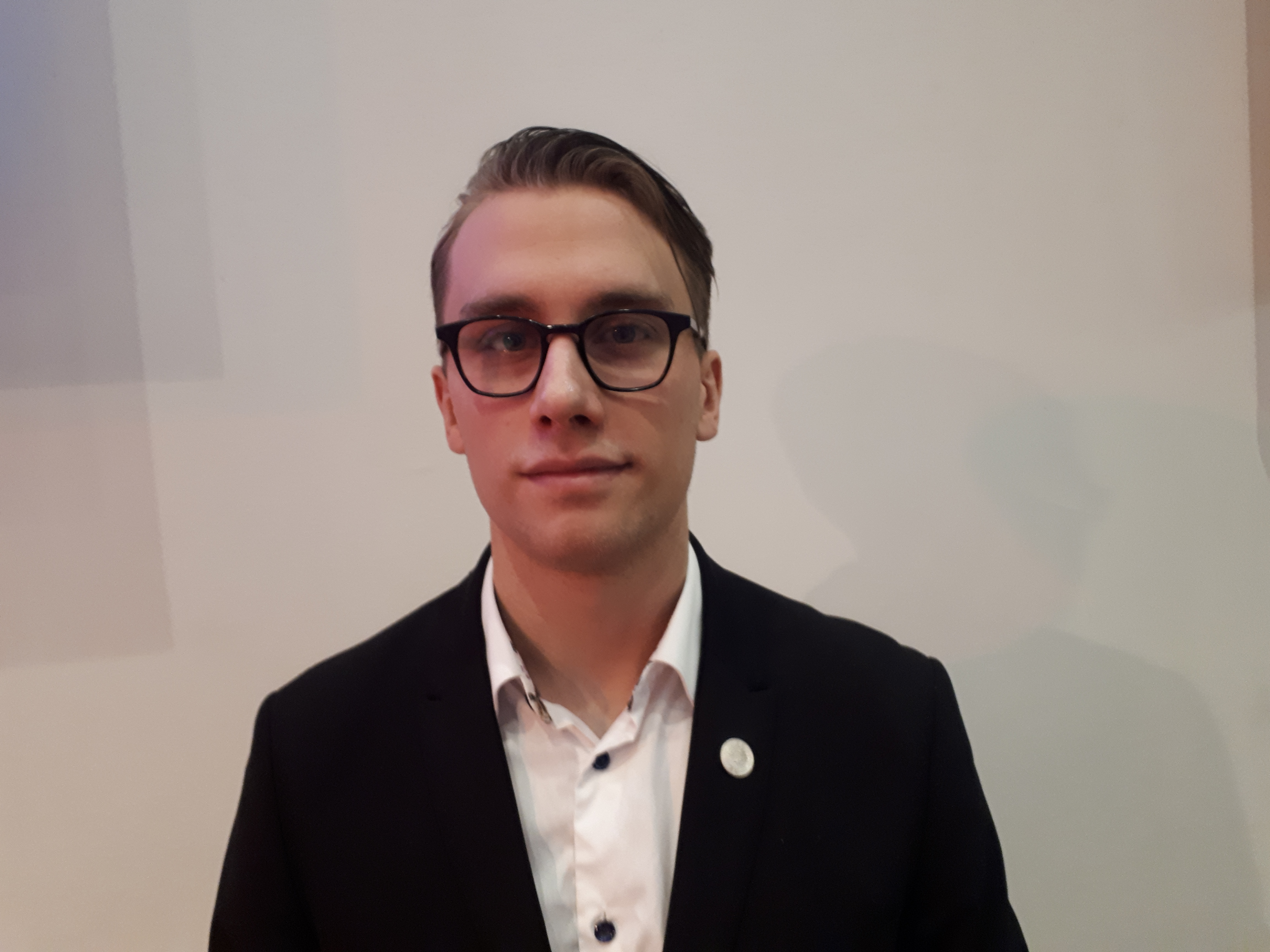 Riksdagsledmoten Dennis Dioukarev (SD) efter en debatt på Stadsbiblioteket i Göteborg måndag den 4:e februari 2019.